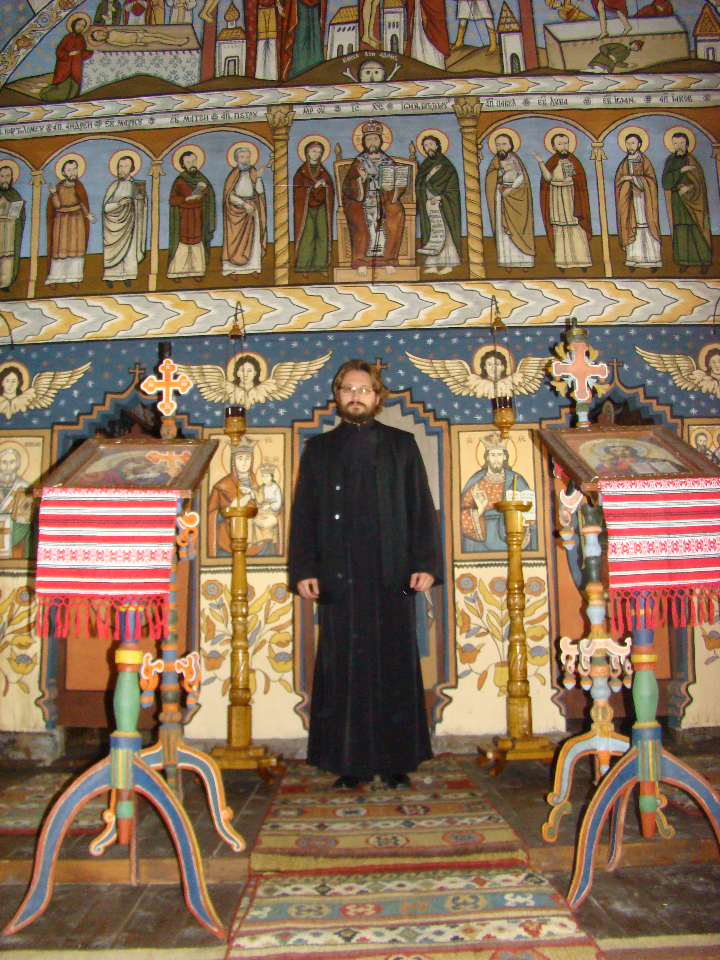 Biserica de lemn „Sf. Trei Ierarhi" din Ghighișeni mutată la Cucuceni